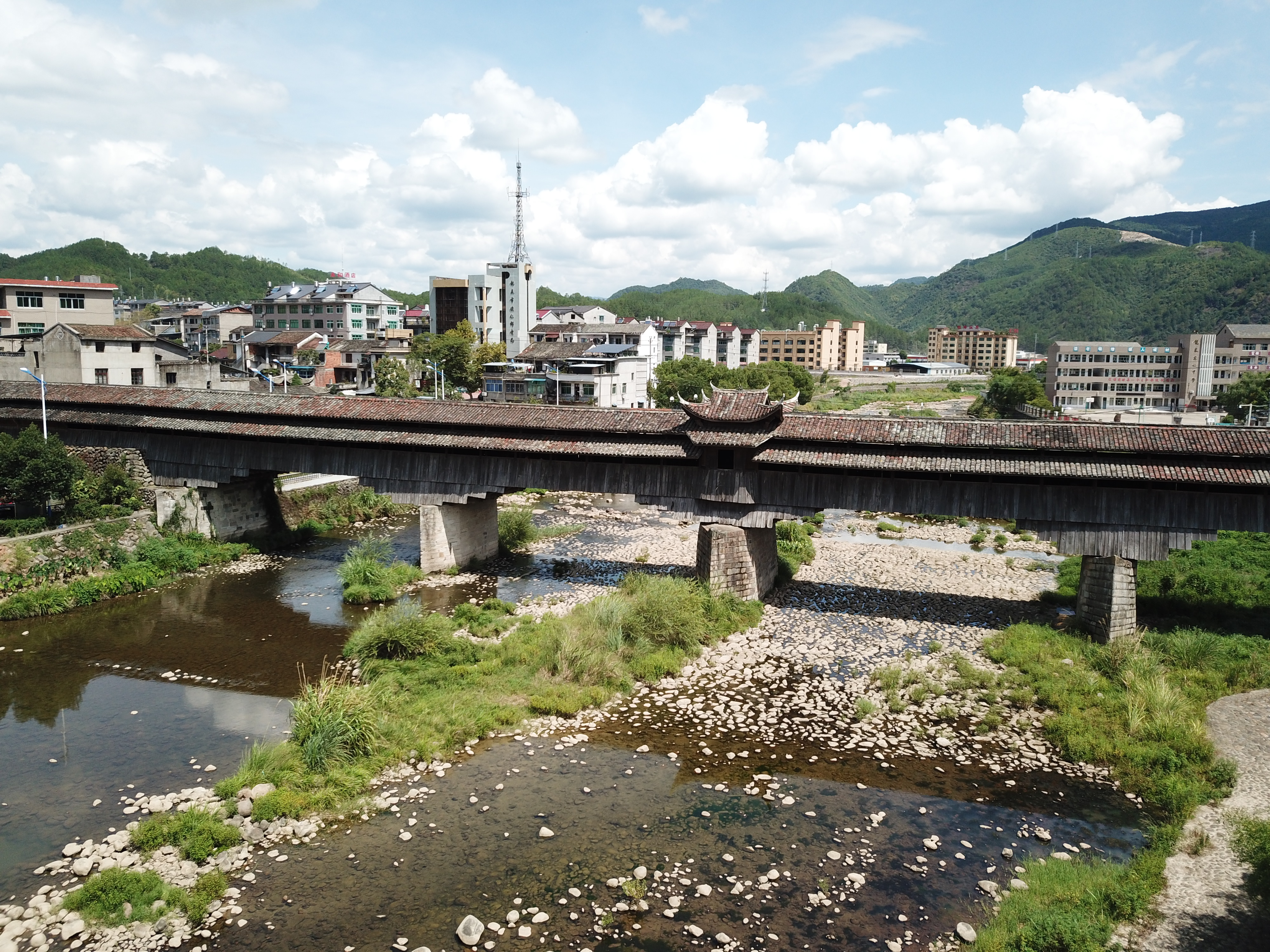 龙泉·永和桥